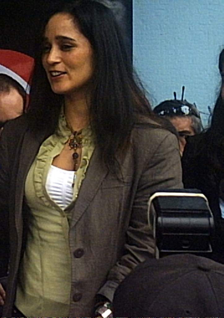 Julieta Venegas firmando autógrafos en Feria del Disco después de su presentación en Viña del Mar